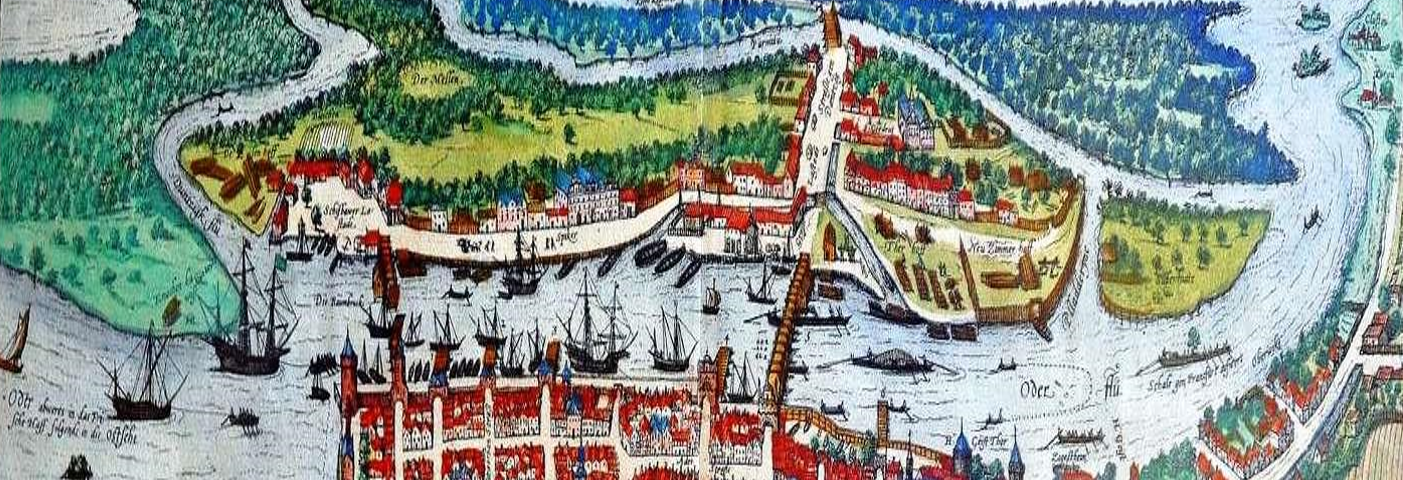 Fragment planu Szczecina z pracy Georga Brauna & Fransa Hogenberga „Civitates Orbis Terrarum” t. IV z 1581 roku